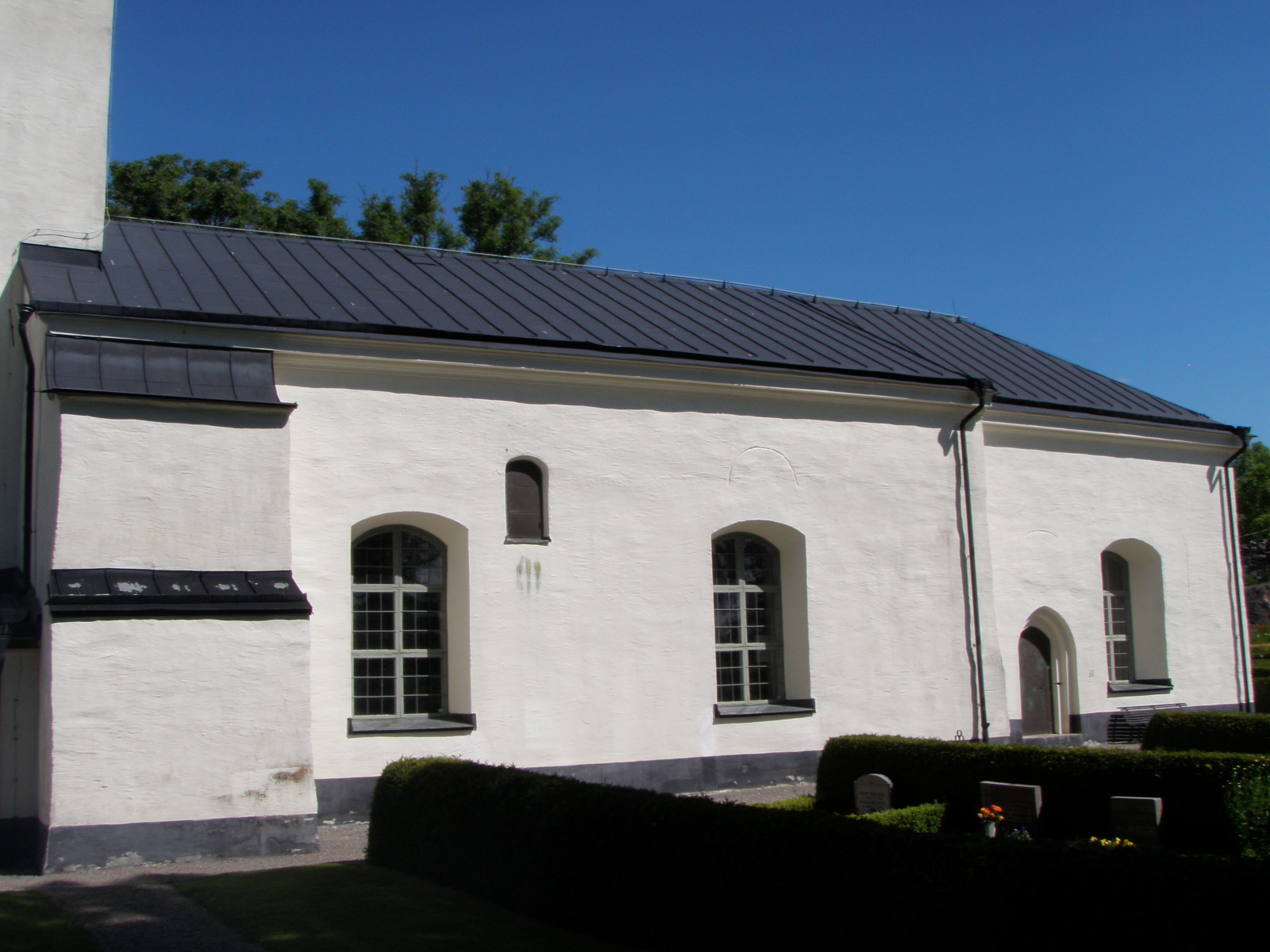 Tingstads kyrka är medeltida och uppfördes under första hälften av 1200-talet, men har byggts till under århundradena, bland annat 1769 då tornet tillkom och skeppets exteriör ändrades på 1860-talet.